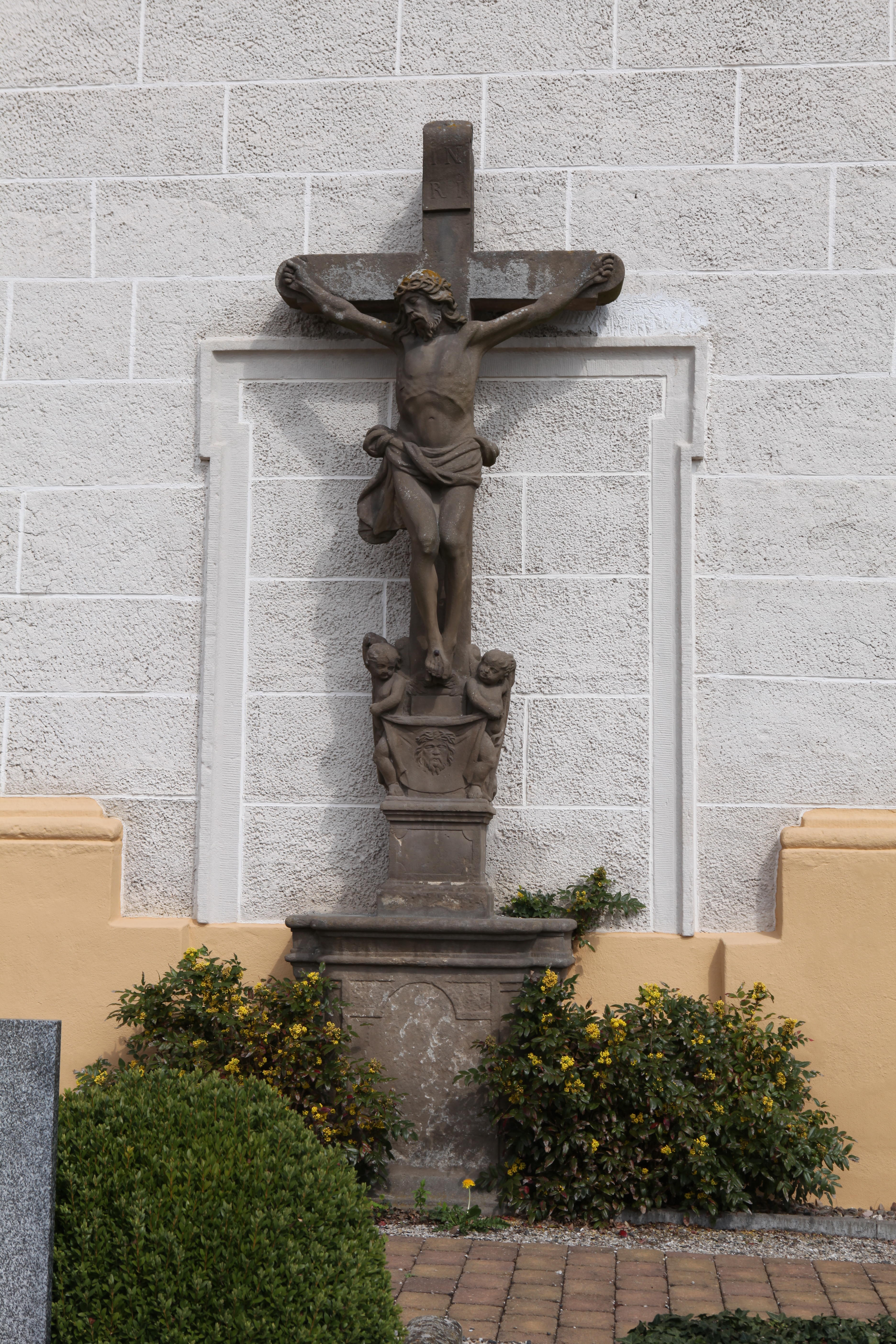 Seßlach Kruzifix an der Friedhofskapelle